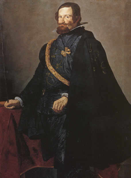 Comte-Duc d'Olivares. Retrat de Velázquez o de Gaspar Crayer, Madrid, Col. Fernández Araoz